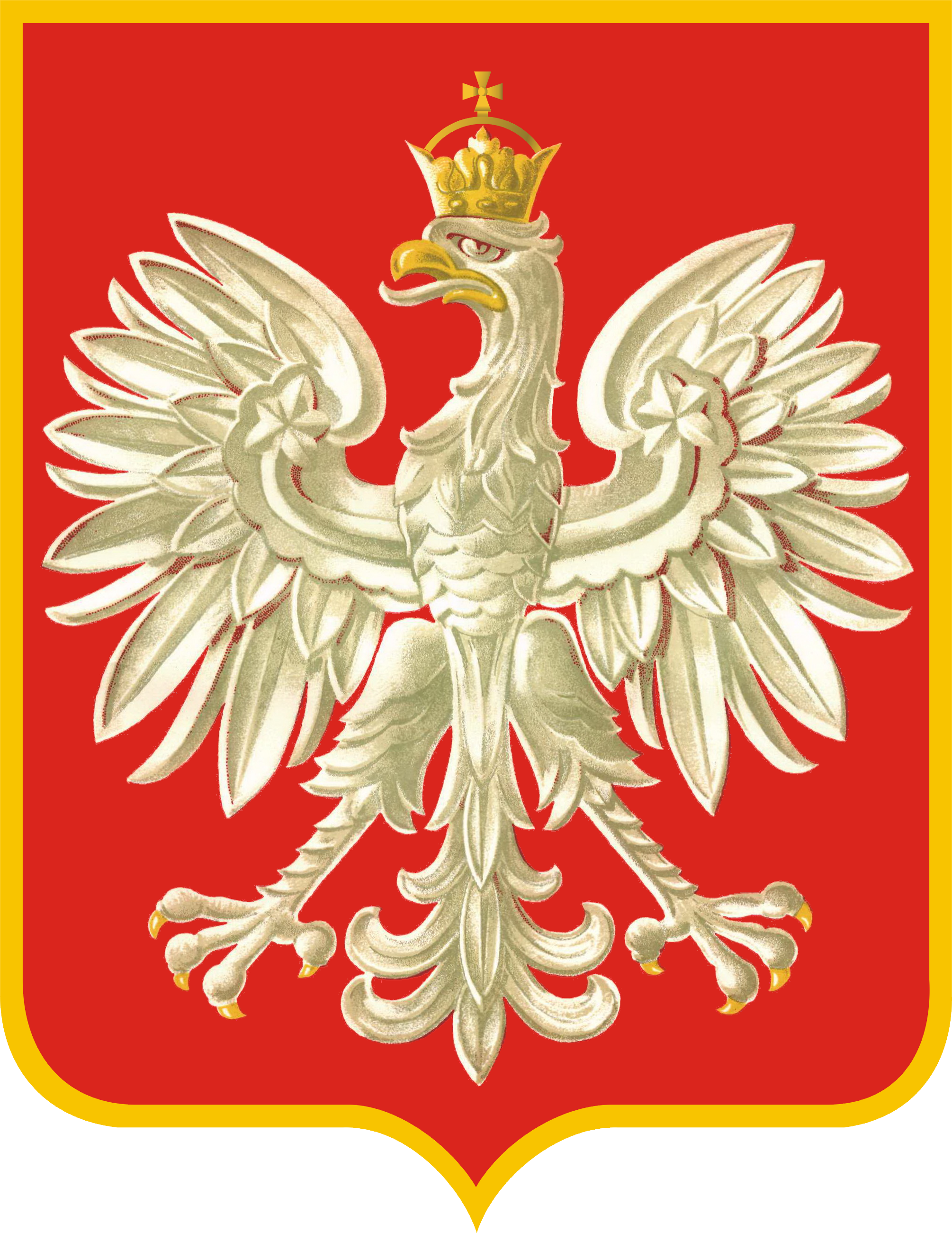 Herb Rzeczypospolitej Polskiej obowiązujący od 8 grudnia 1956 r. (Dz. U. z 1956 r. Nr 3, poz.1)